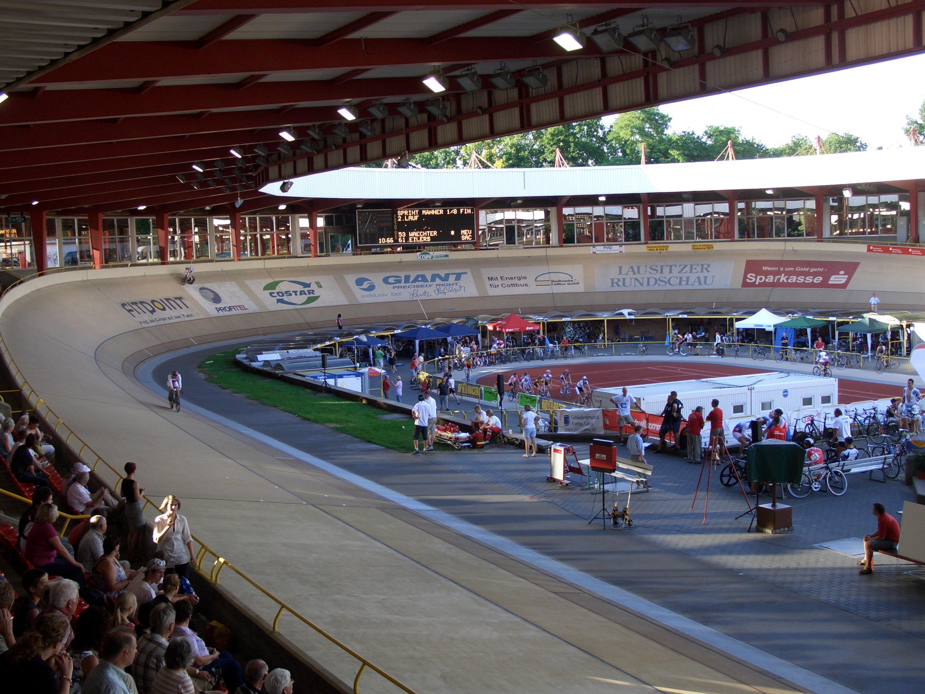 Innenraum des Cottbuser Radstadions bei den deutschen Bahnmeisterschaften 2010